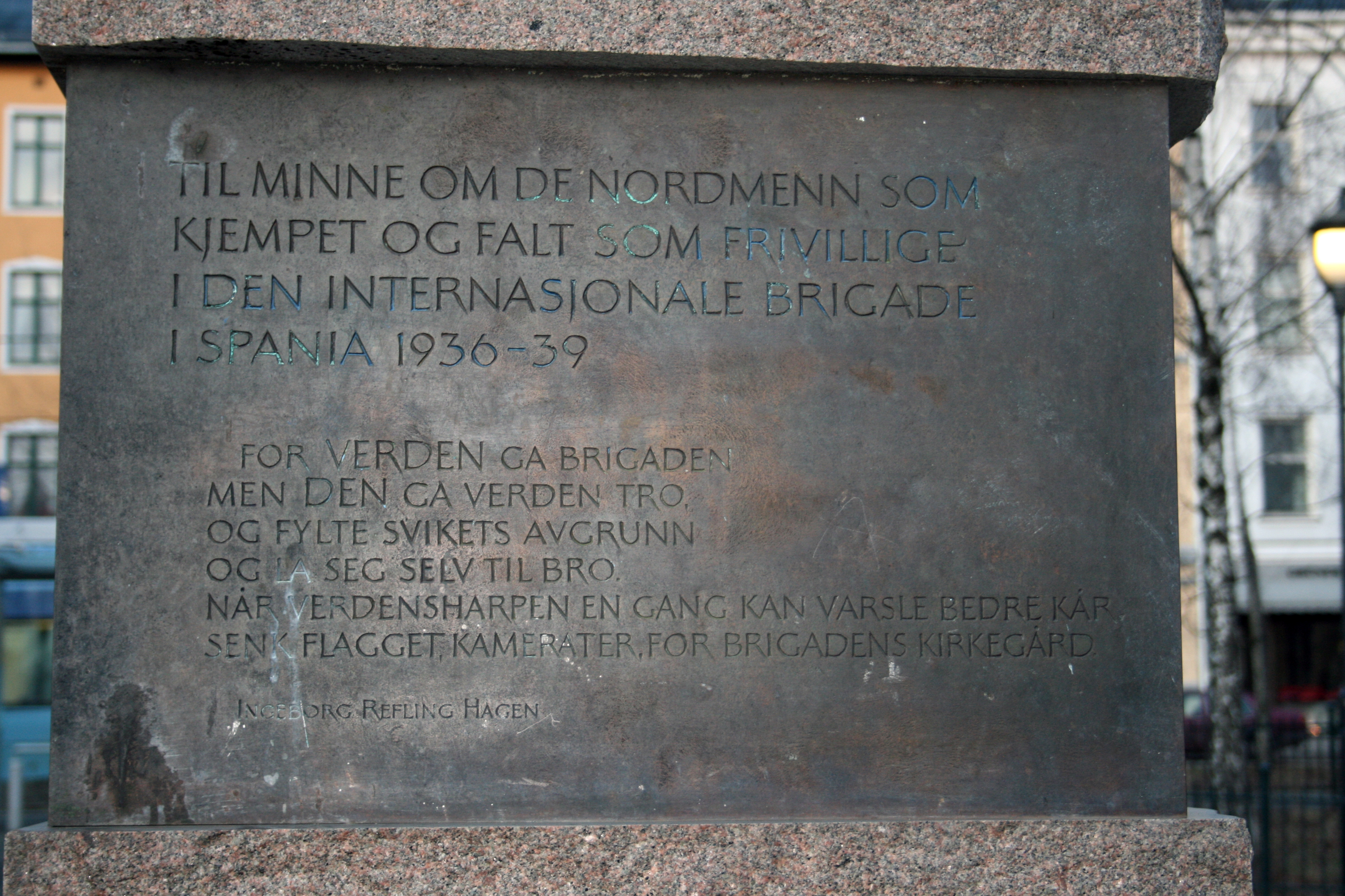 Teksten på monumenet over nordmenn i Den internasjonale brigaden i den spanske borgerkrigen; Birkelunden, Oslo. Dikt av Ingeborg Refling Hagen